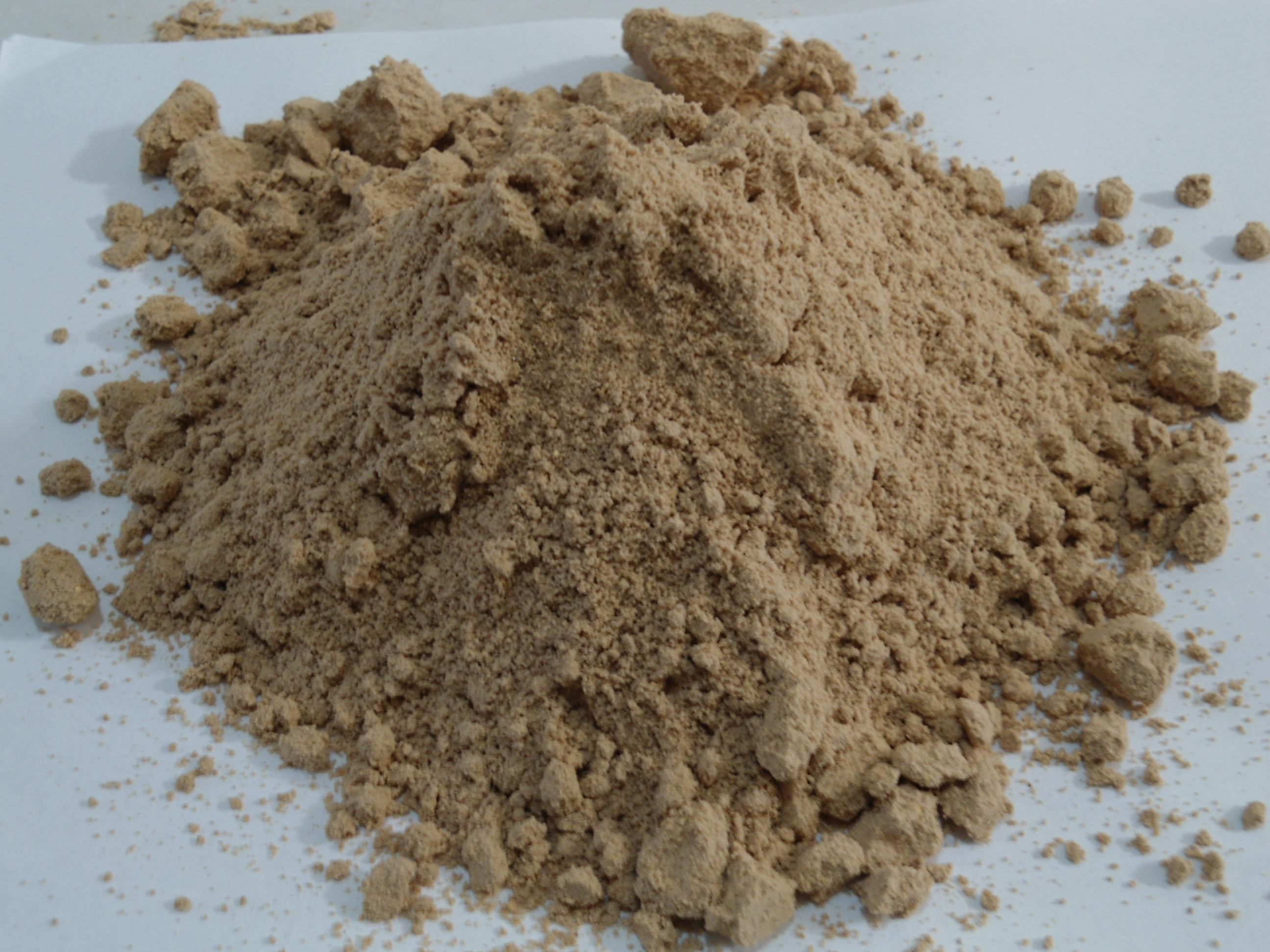 "Polvillo" bebida típica del estado de Tabasco, México, la cual se elabora con harina de maíz tostado, adicionada con cacao tostado y molido. Se puede beber frío o caliente y se la añade azúcar o puede tomarse simple.